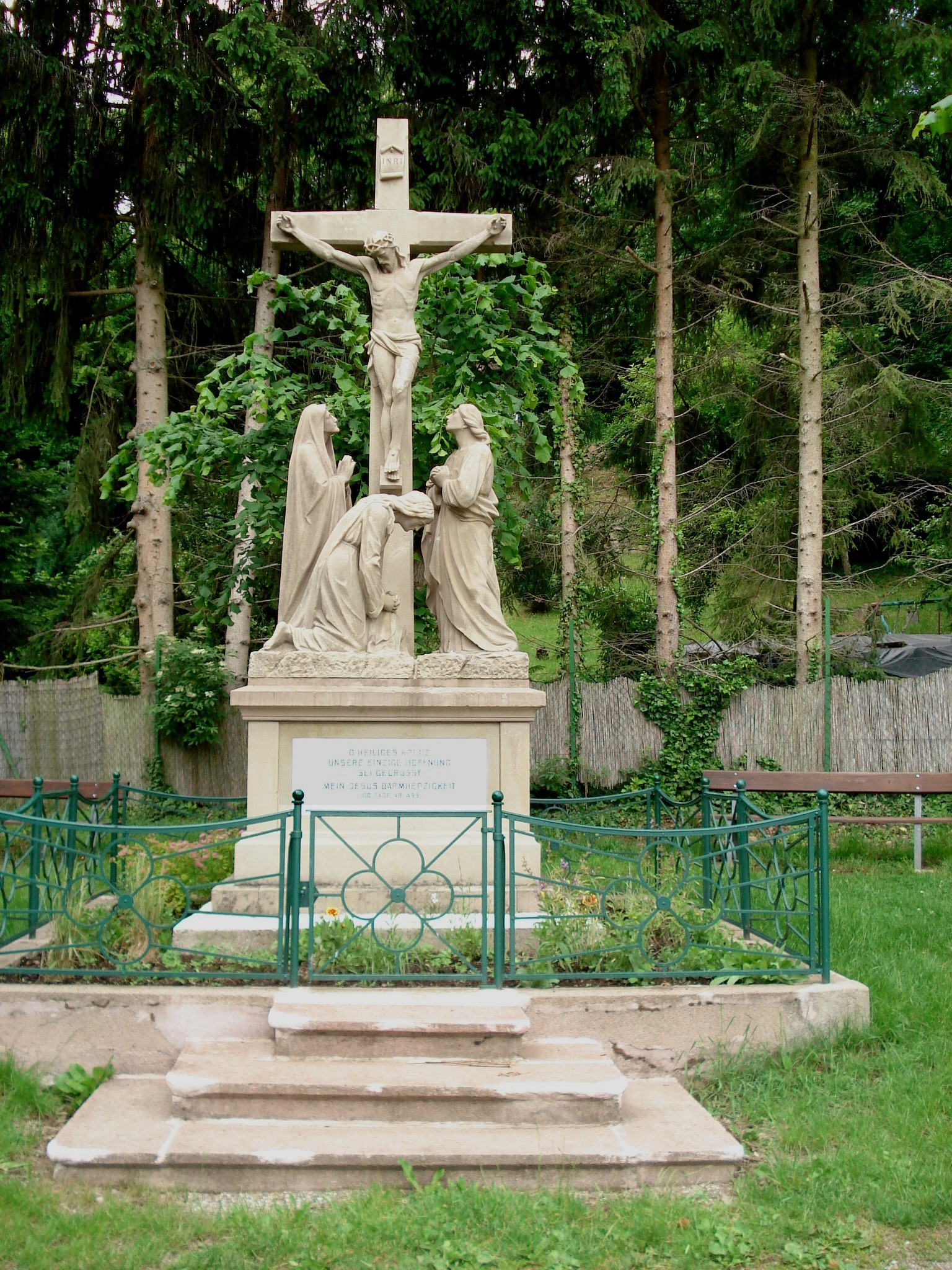 Le calvaire rénové (2009) de la place du Dürrenberg